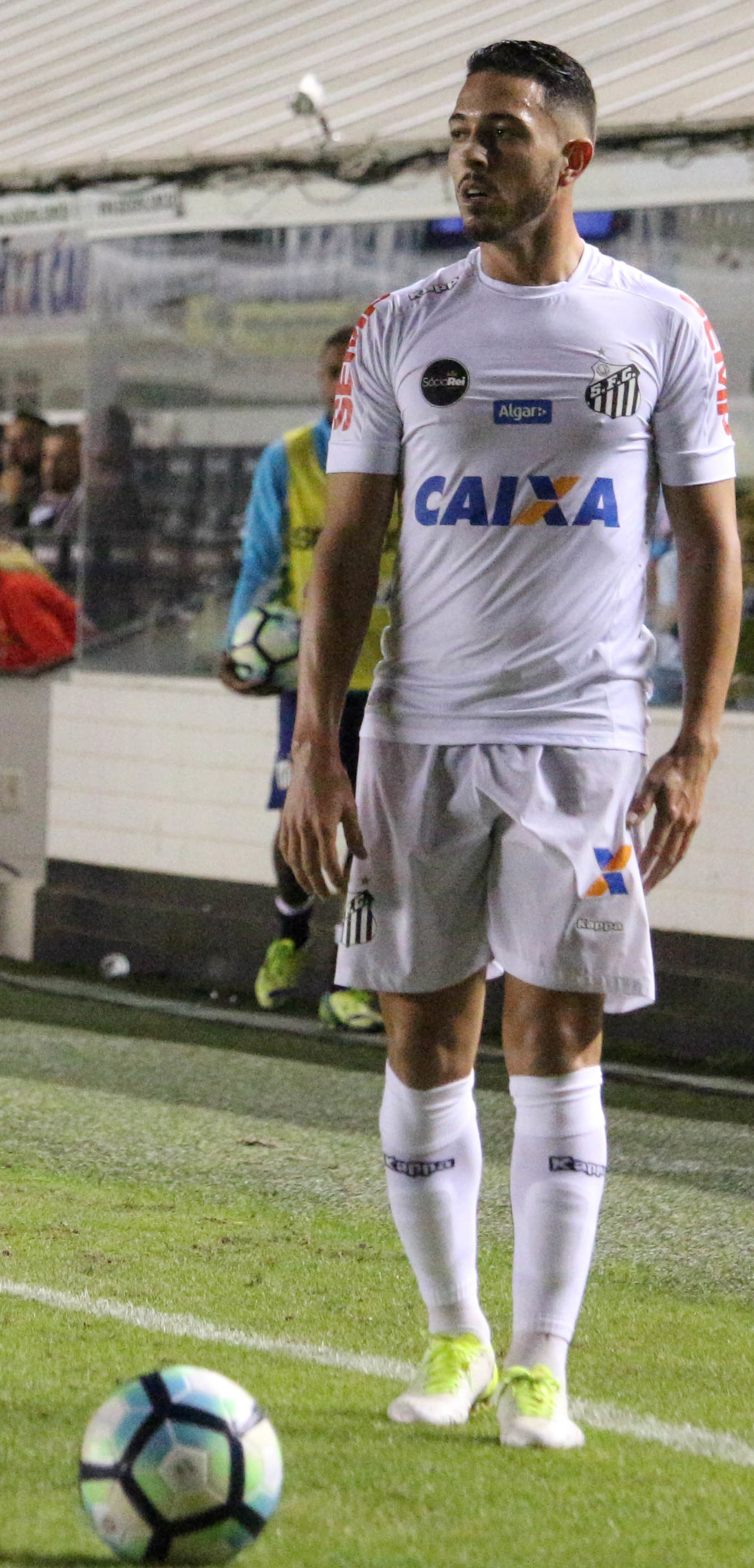 Foto: Douglas Teixeira/Futebol Santista